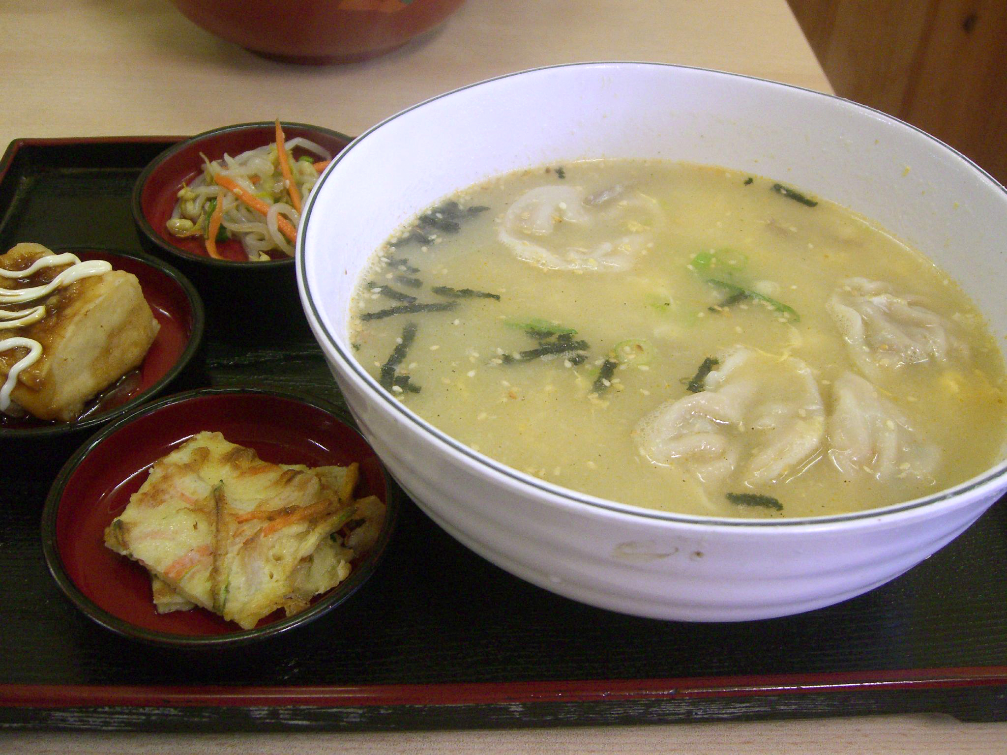 Manduguk, a Korean soup made with mandu(dumpling)